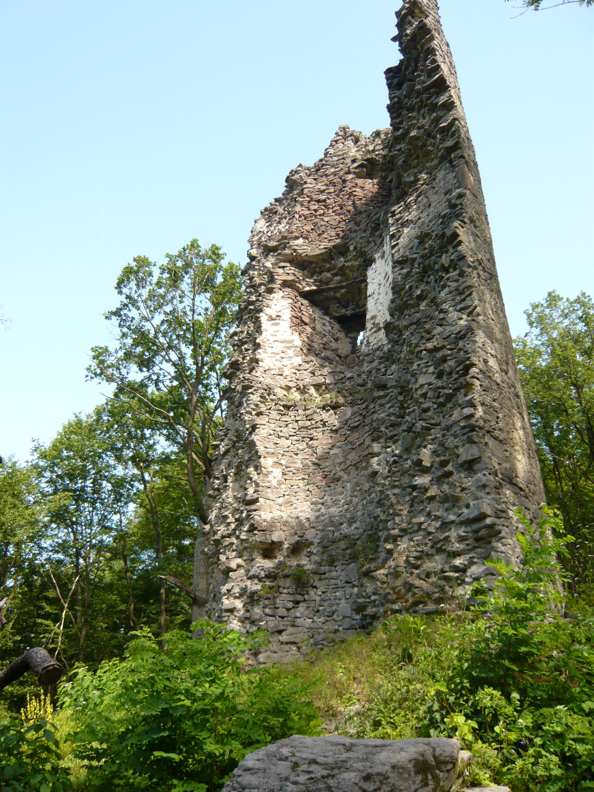 Hrad Živánska veža, Slovensko